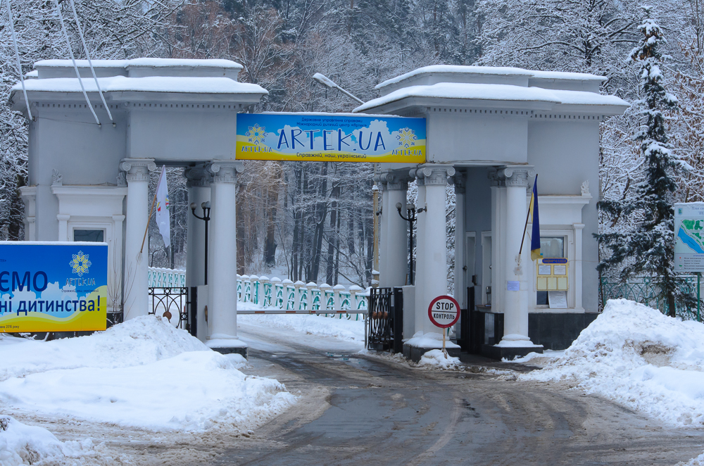 Фото центрального в'їзду в Артек, зима, 2017. На фото видно міст через озеро.